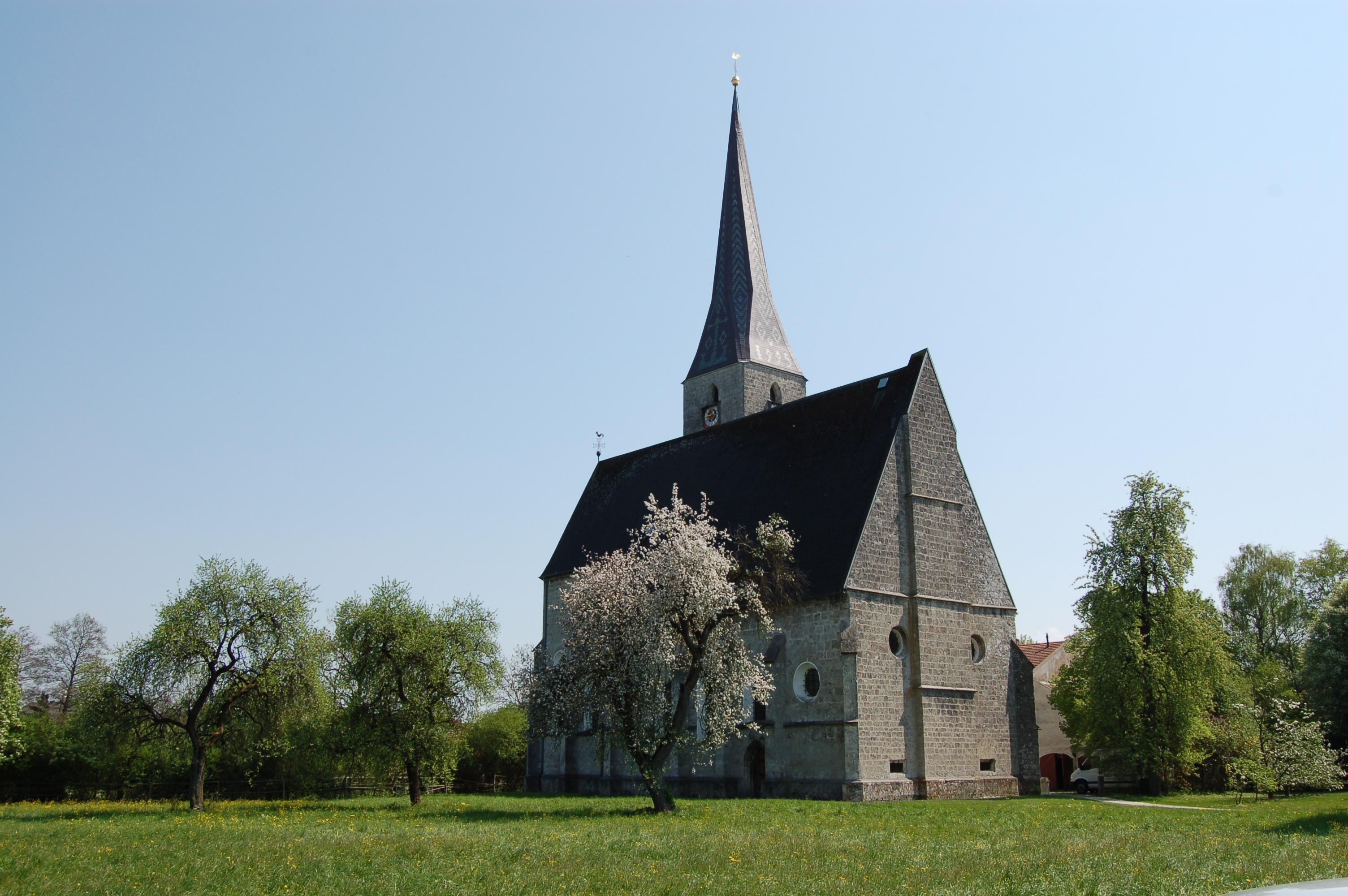 Die Katholische Filialkirche hl. Valenti in Haselbach 9 in Braunau am Inn (Oberösterreich).